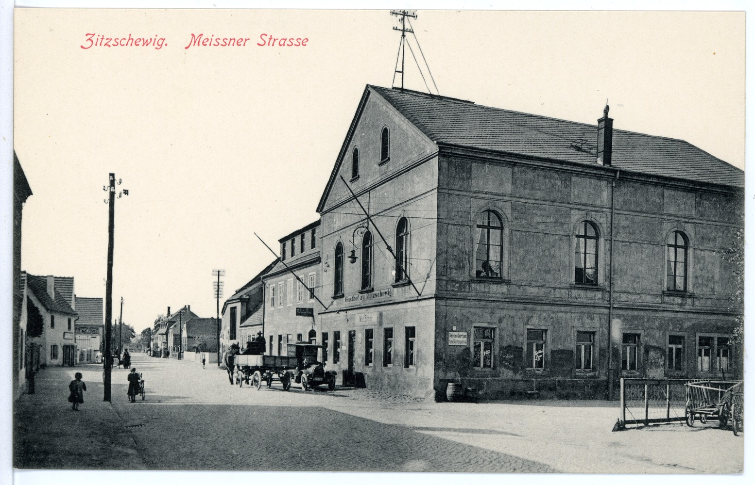 Radebeul; Meißner Straße - Zitzschewig This postcard is from publisher Brück & Sohn in Meißen ( postcard has a unique number 15680 and is available in a higher resolution at the publisher. This images was uploaded in a cooperation project between Wikipedians and the publisher.